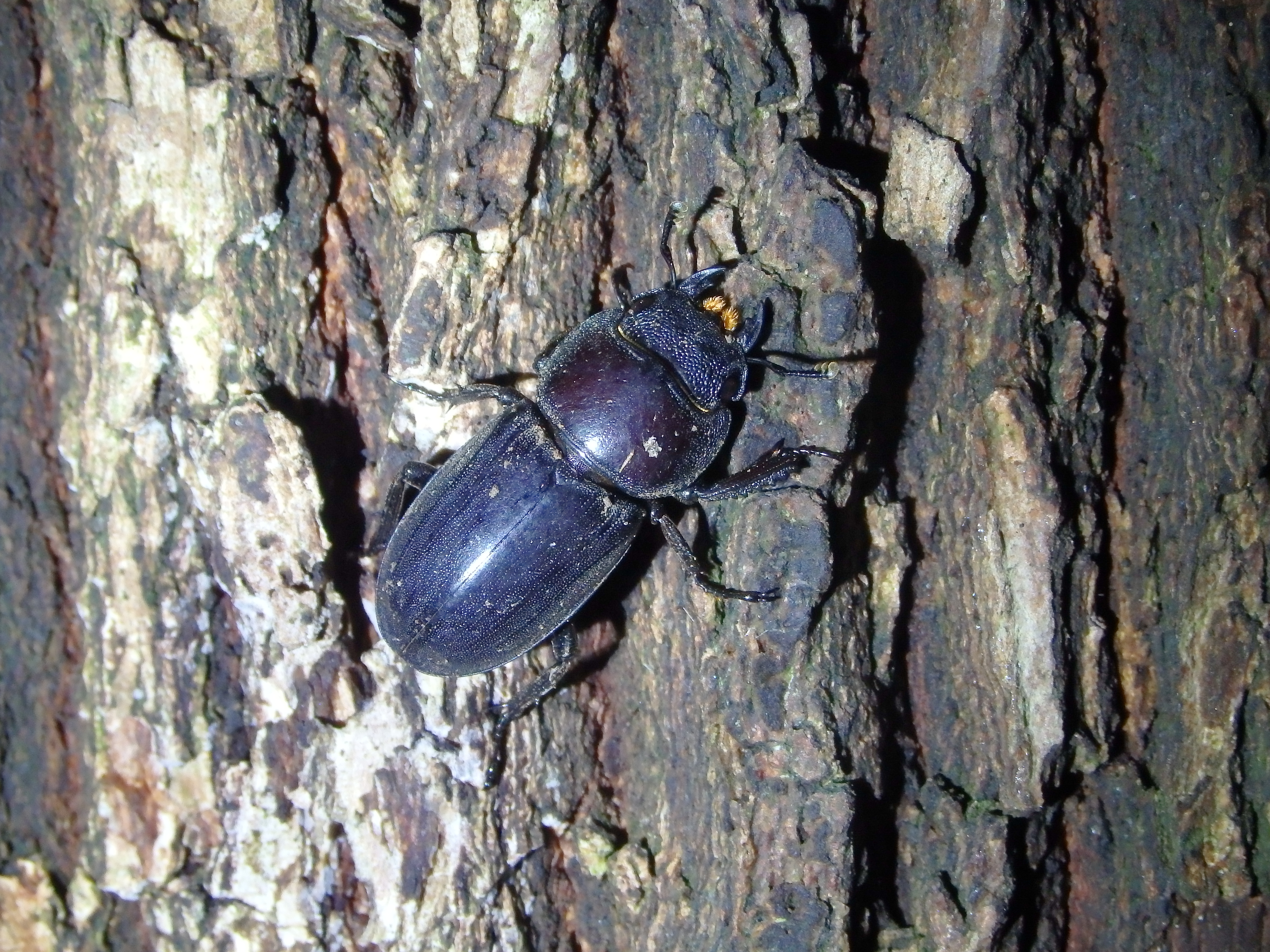 ヒラタクワガタのメス